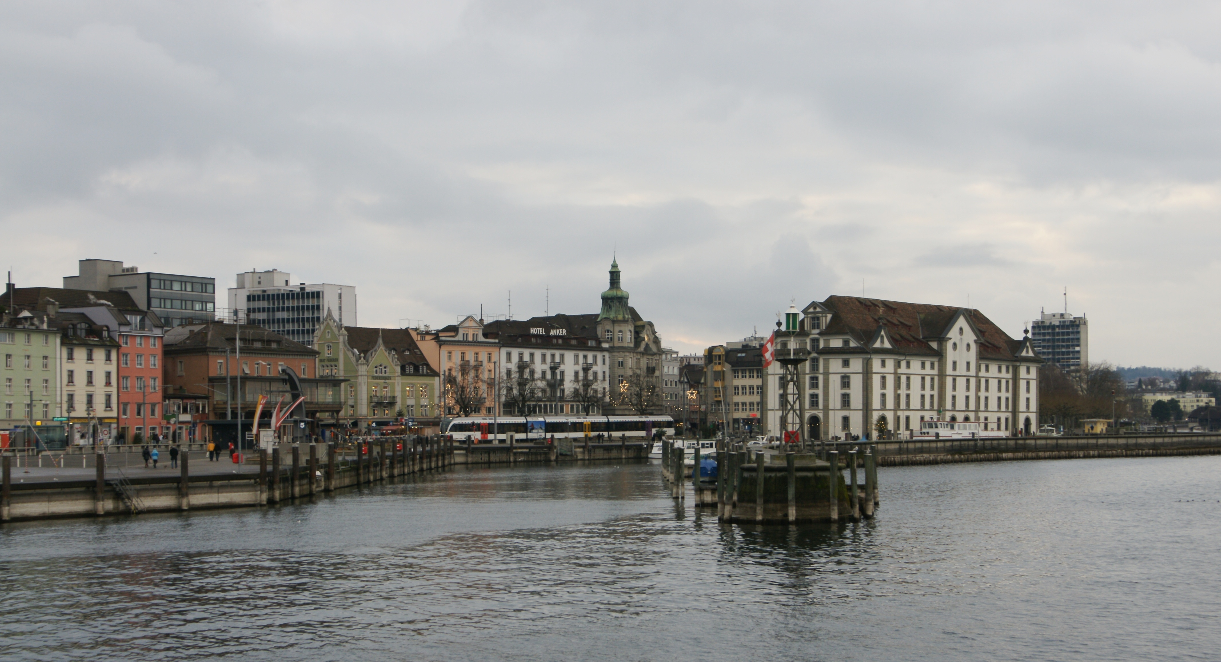 Blick in die Hafeneinfahrt von Rorschach am Bodensee. Rechts das Wahrzeichne der Stadt am See: das Kornhaus.